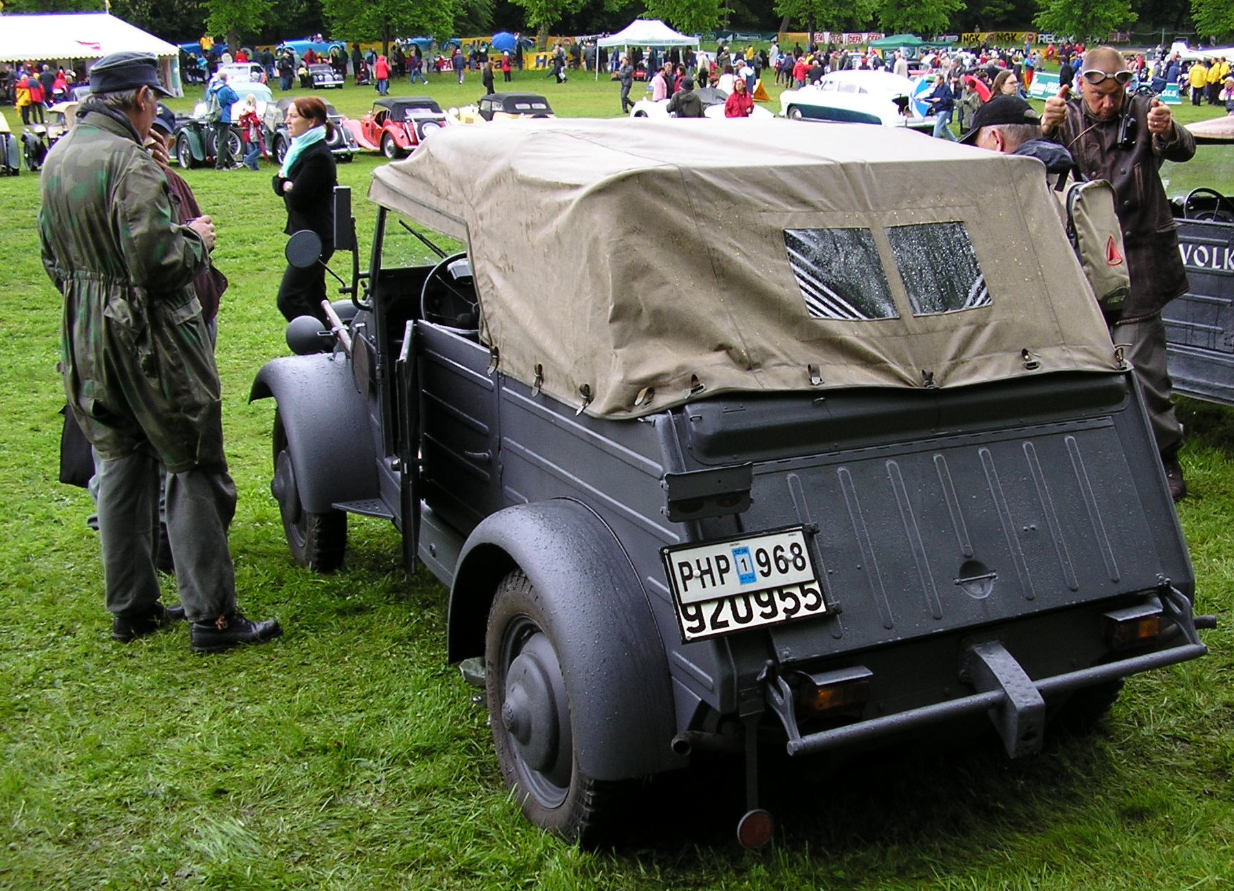 A 1942 VW Kübelwagen (type 82).